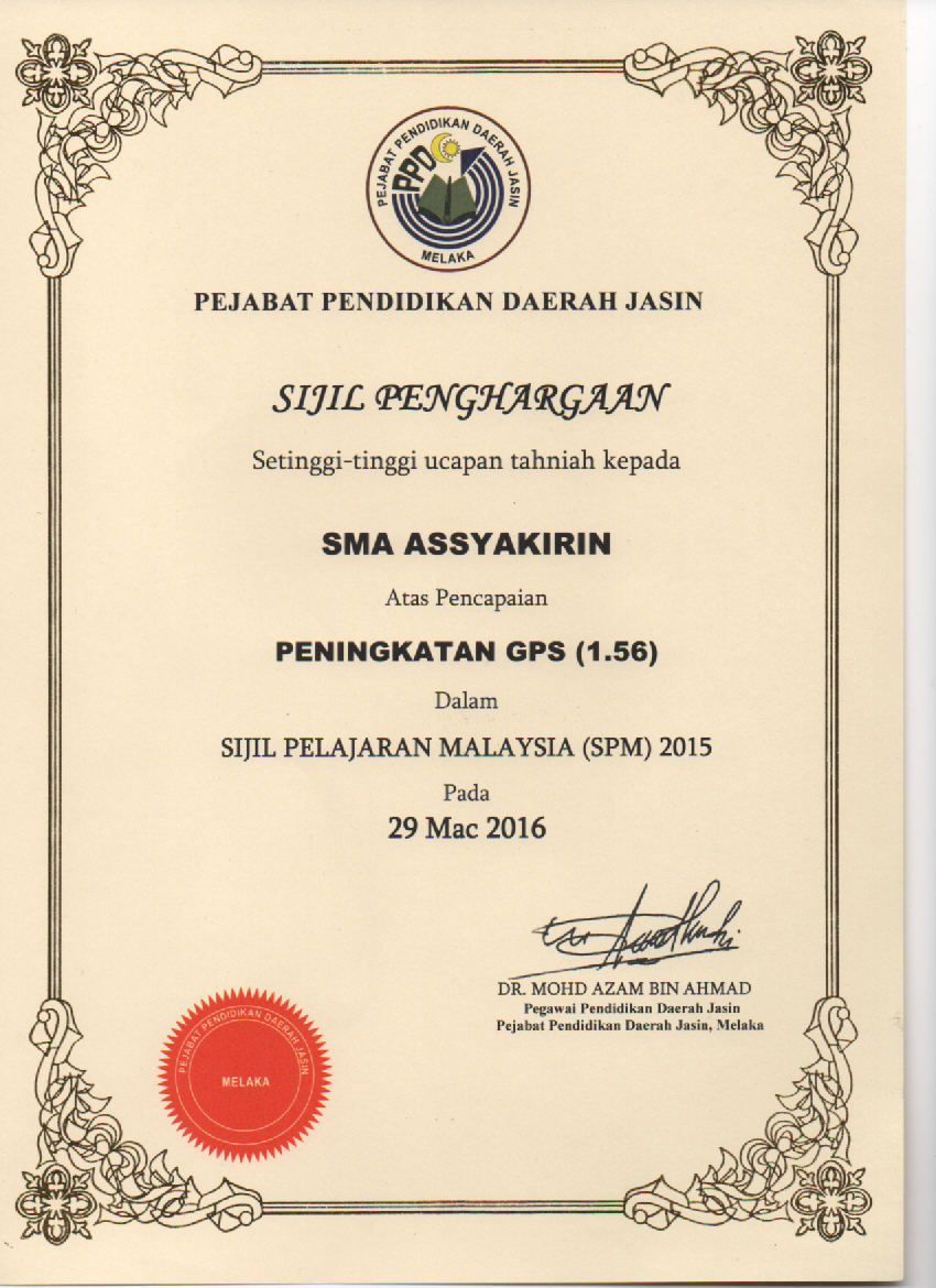 Sijil Penghargaan Cemerlang SPM 2015